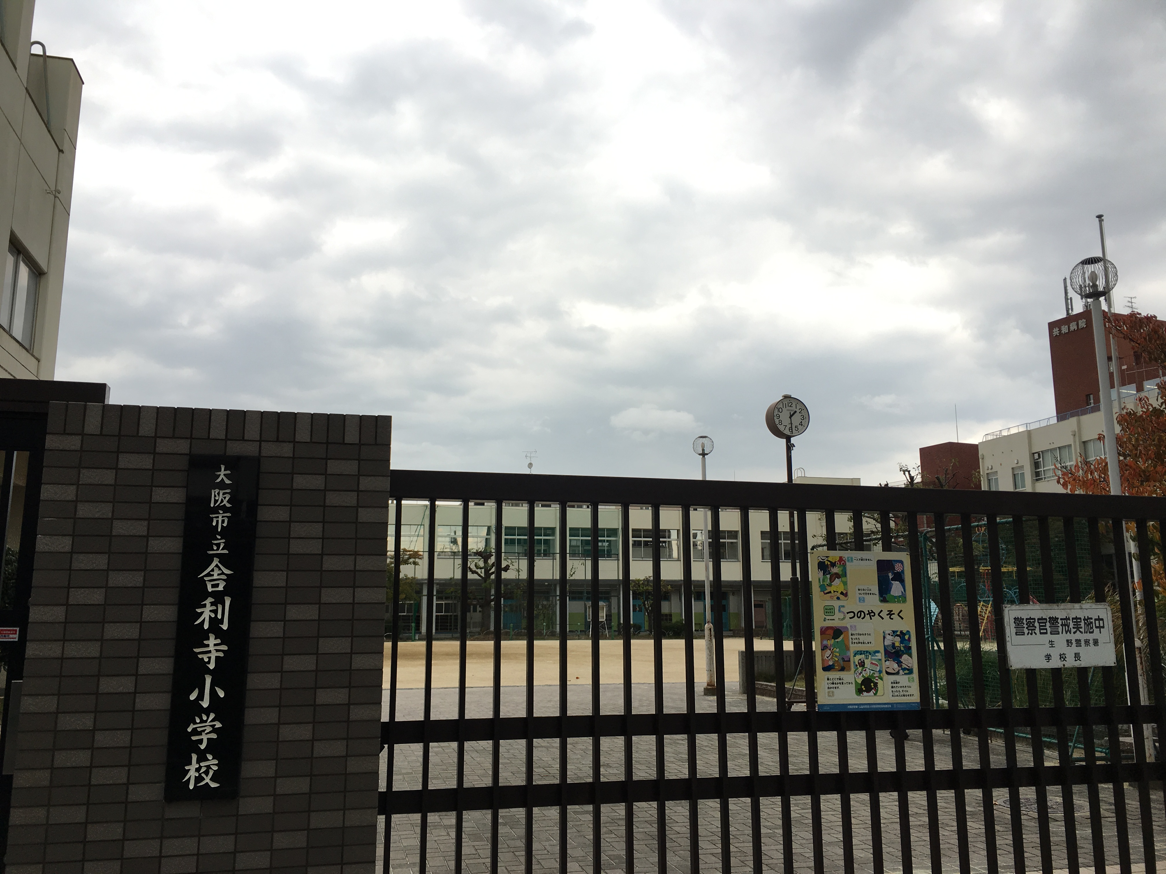 舎利寺小学校